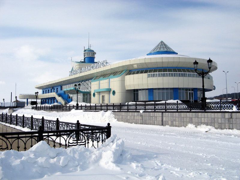 Речной порт и автовокзал в Ханты-Мансийске